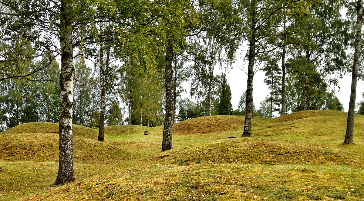 Värmlands största gravfält.